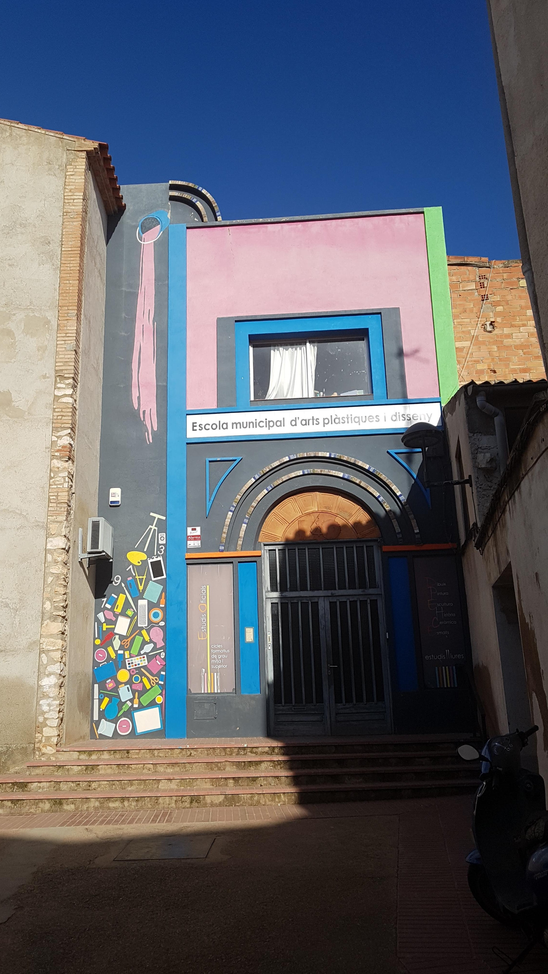 escola d'arts mora la nova